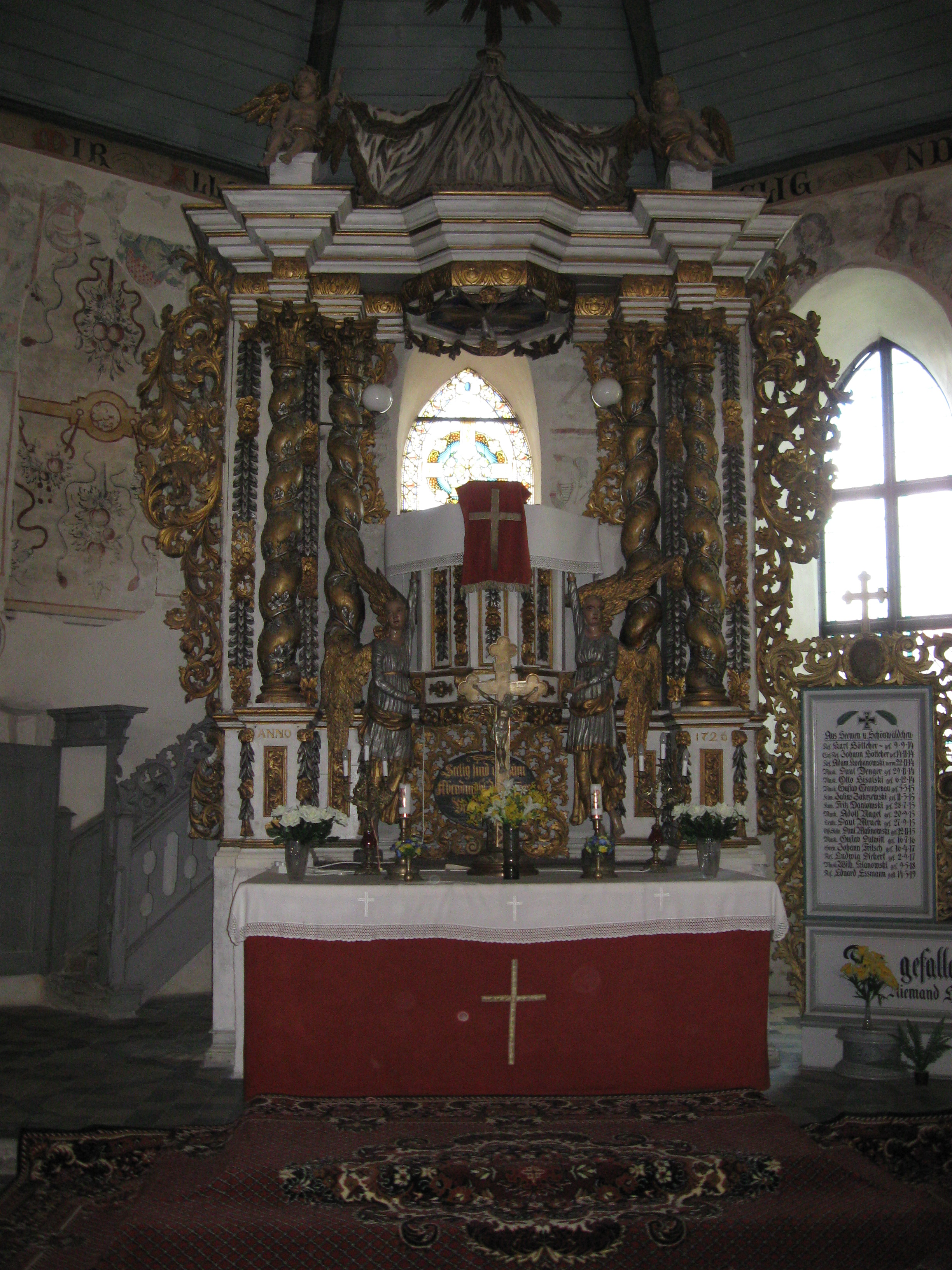 Dąbrówno - Ołtarz w dawnym kościiele ewangelicko-augsburskim, obecnie metodystów